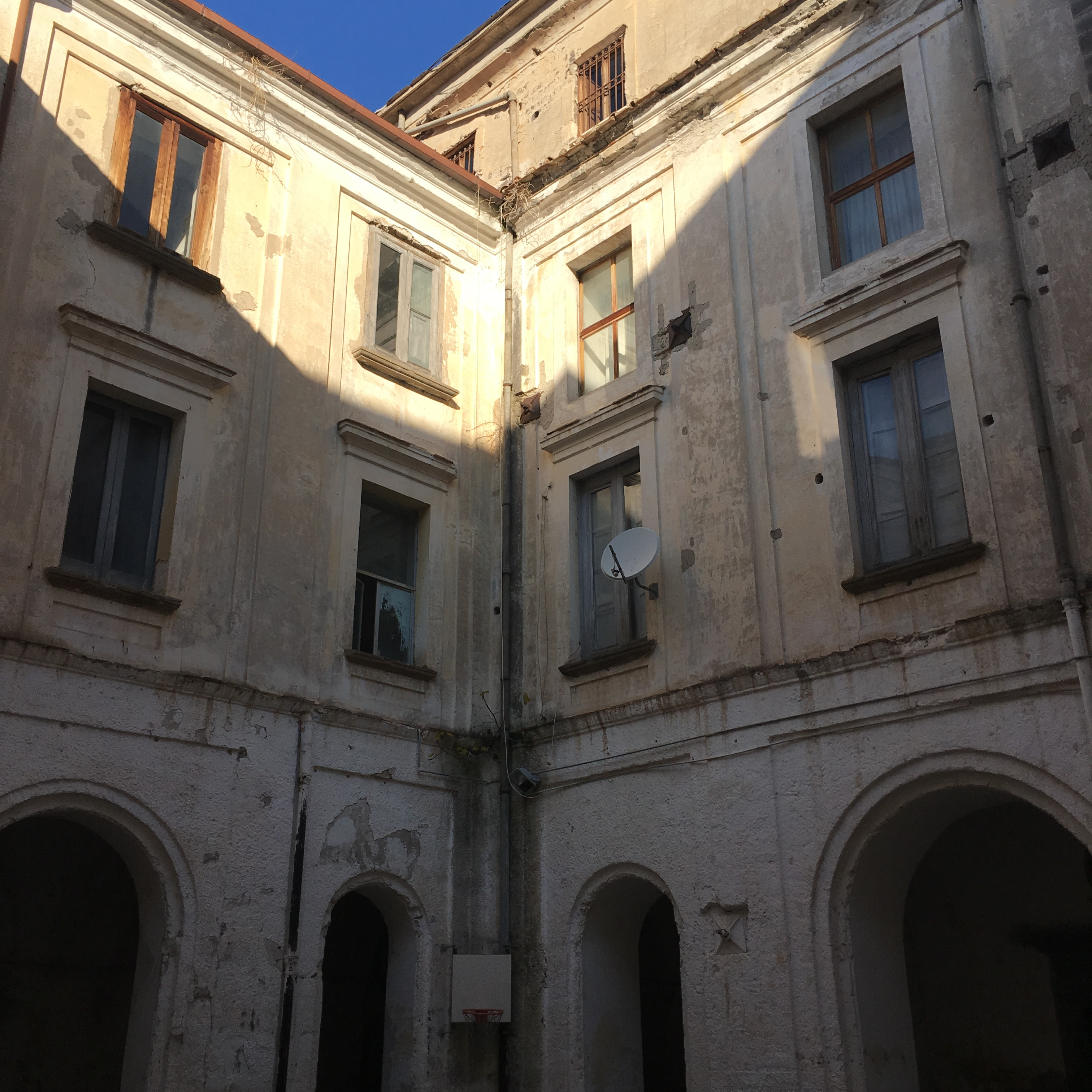 Chiosco del Convitto Nifo a Sessa Aurunca